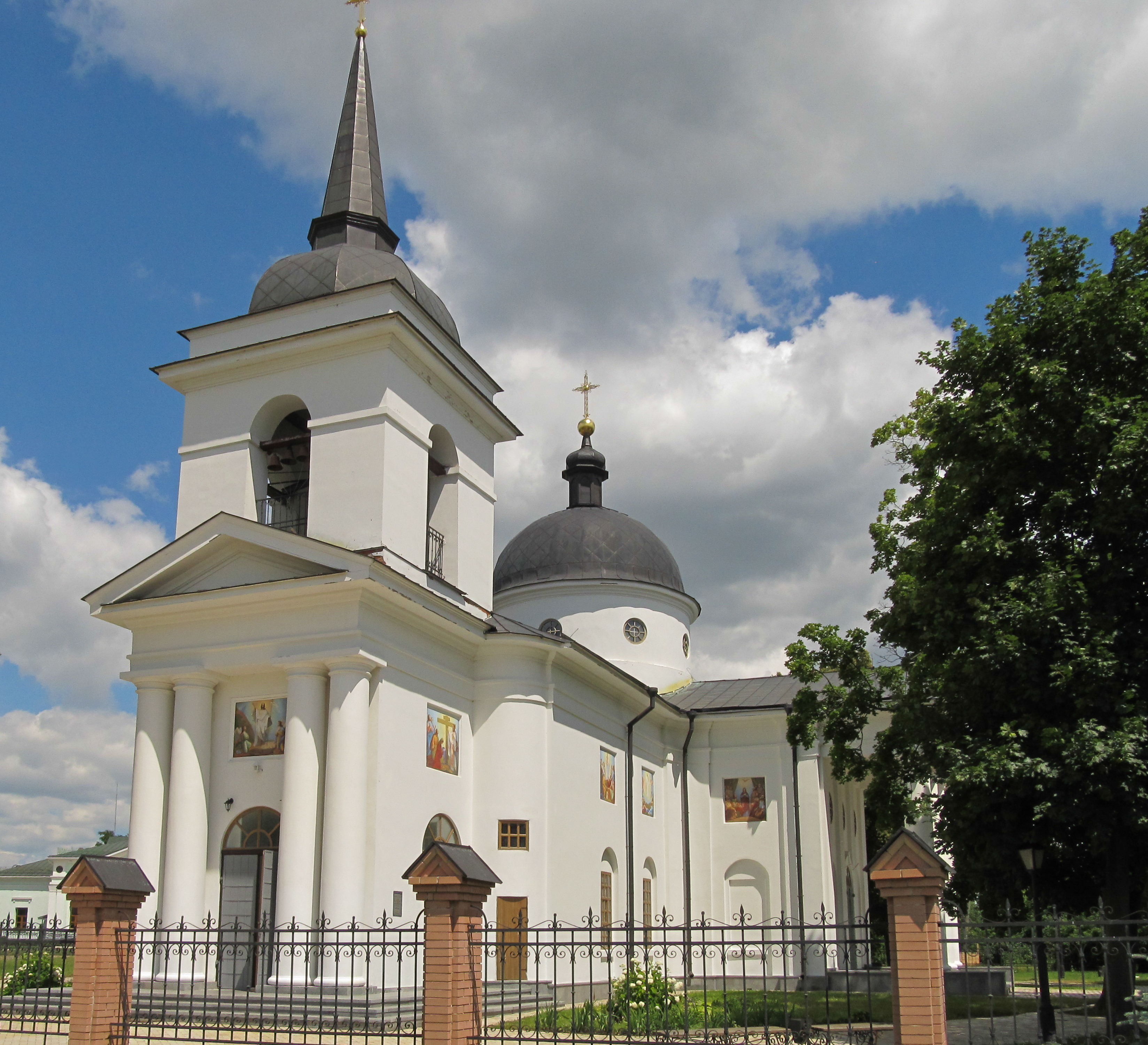 Воскресенська церква – усипальниця К.Г. Розумовського (мур.), Батурин, пров. Центральний, 22